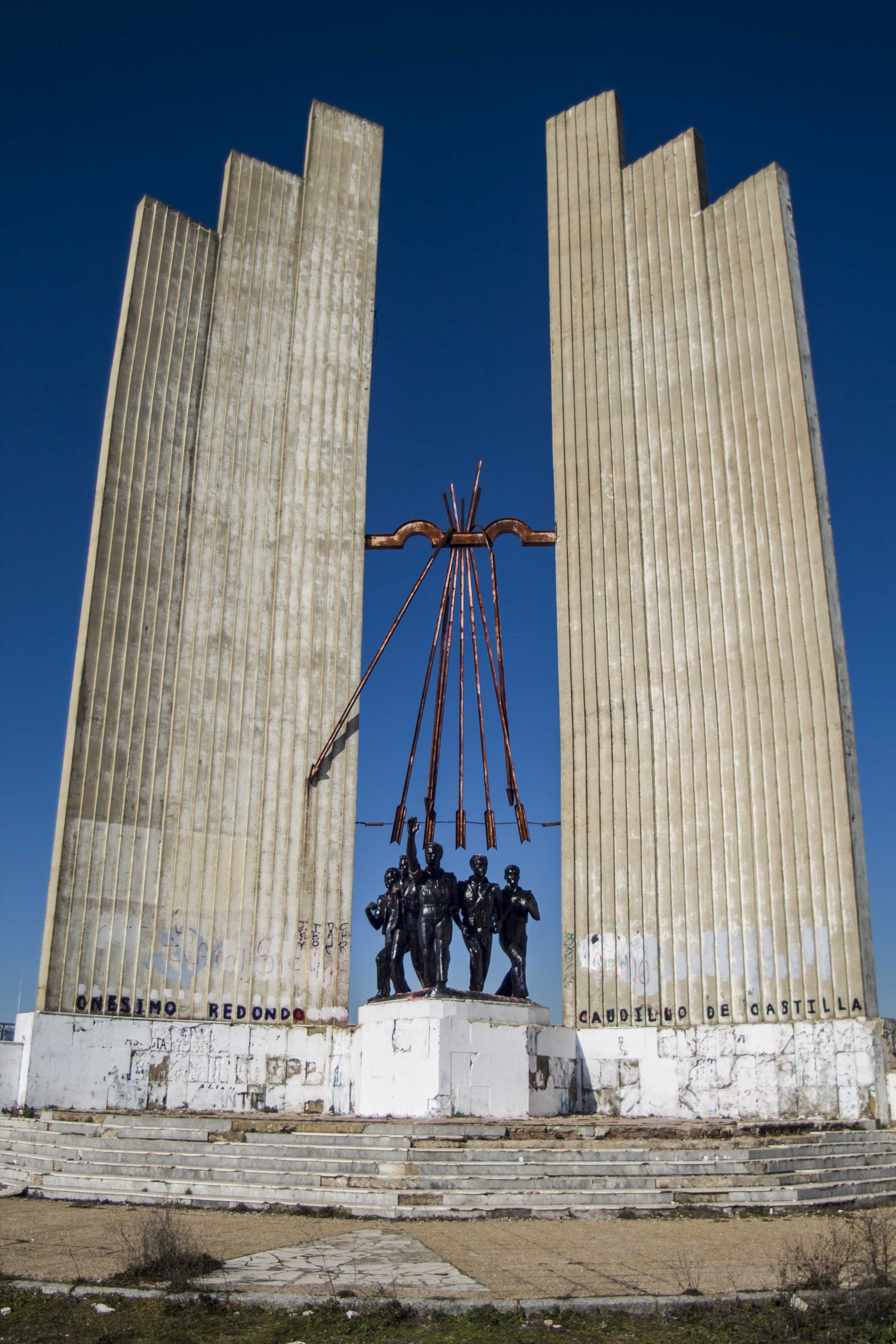 Monumento de Onésimo Redondo (Valladolid)